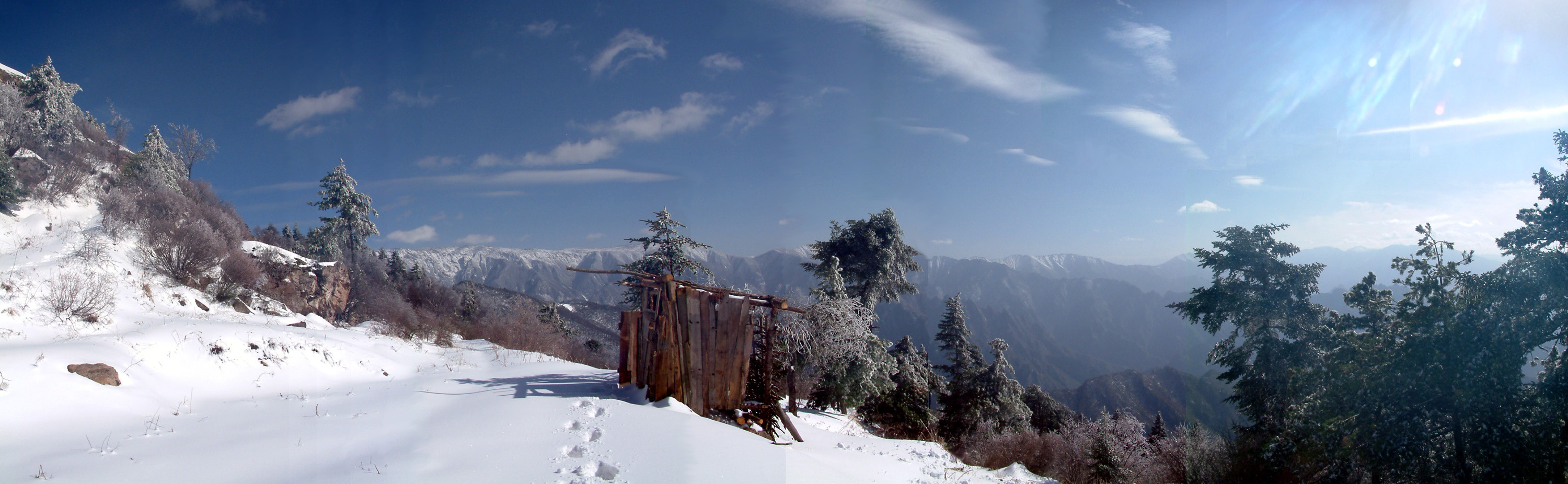 太白群山中风景最秀丽的小茅房-自2900米处斗姆宫拍摄-4张拼 过智俊 摄于2004年5月4日 版权所有（见下）